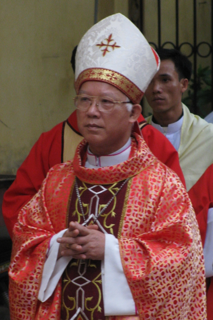 Giám mục phụ tá giáo phận Hà Nội, Lorenso Chu Văn Minh, ảnh chụp tại Nhà thờ chính tòa Hà Nội